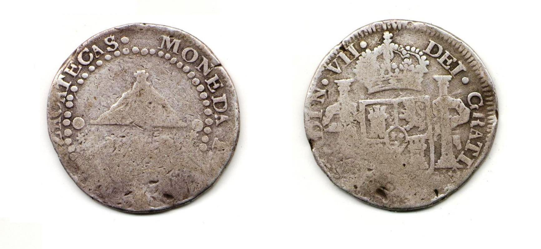 Moneda de 2 reales acuñada en Zacatecas en 1811. El anverso ostenta una representación artística del Cerro de la Bufa.